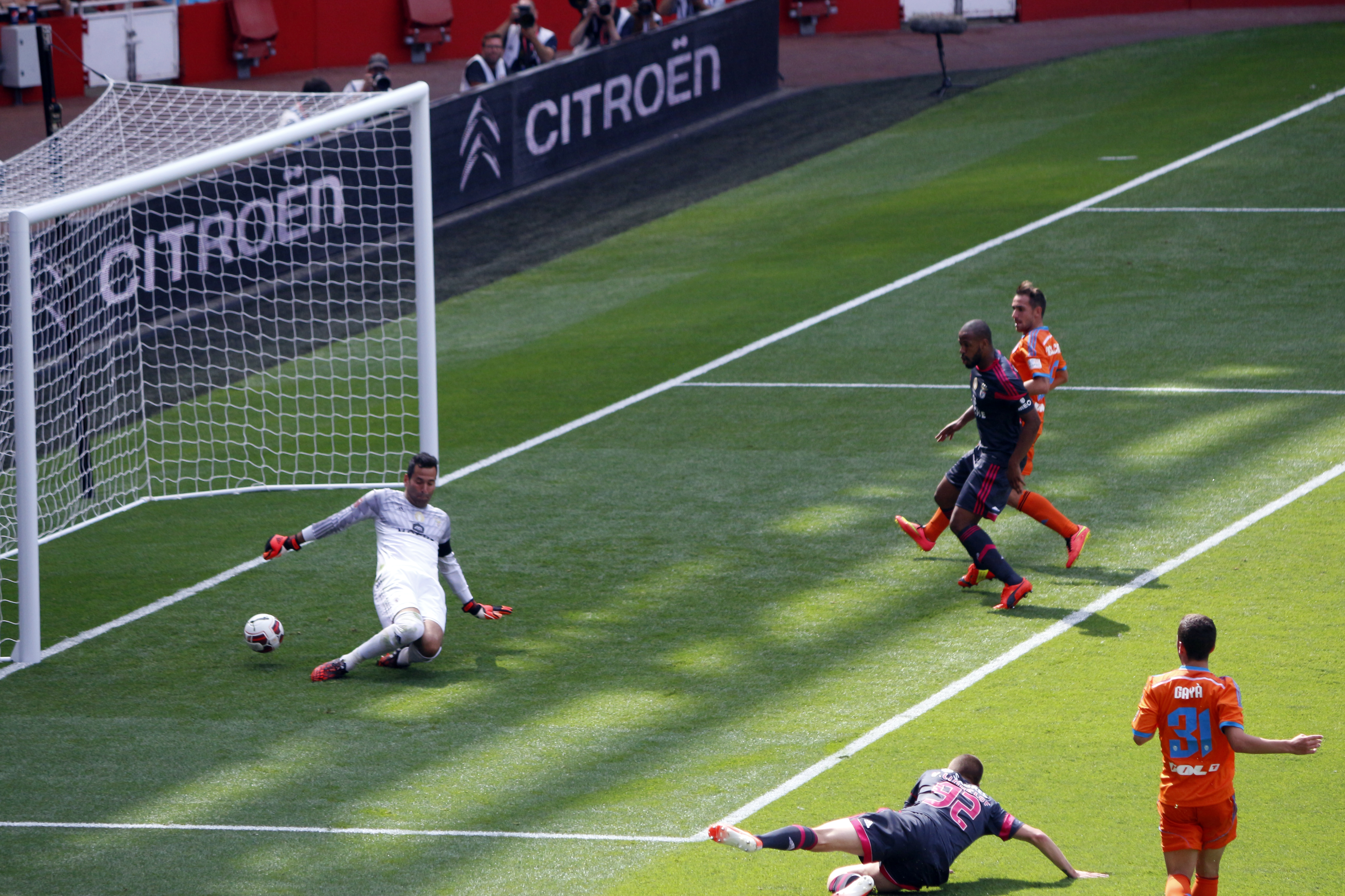 Emirates Cup, 3 d'agost de 2014.